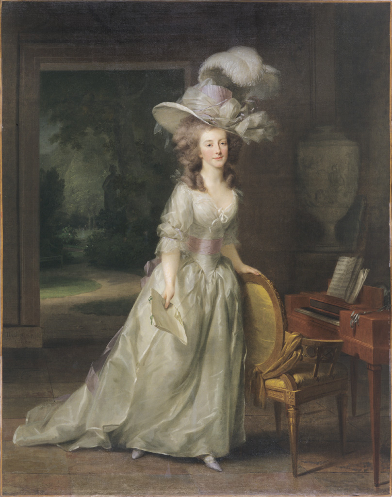 Frédérique Louise Wilhelmine, Princesse d’Orange-Nassau